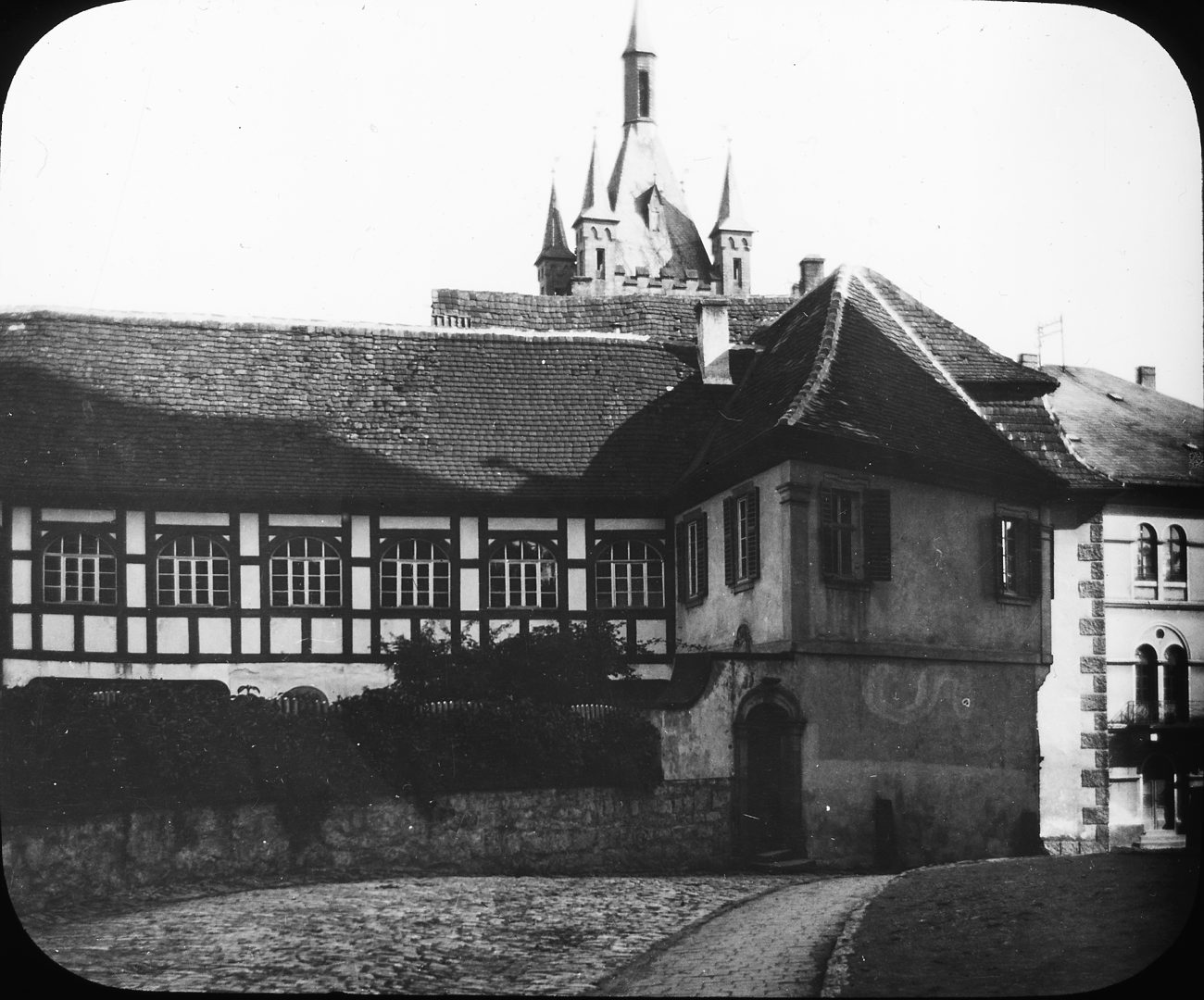 SKC4506 Wimpfen, Wormser Hof 1901. Bakom huset skymtar tornet Blauer Turm. Wimpfen with Blauer Turm, 1901. Photo: Sigurd Curman